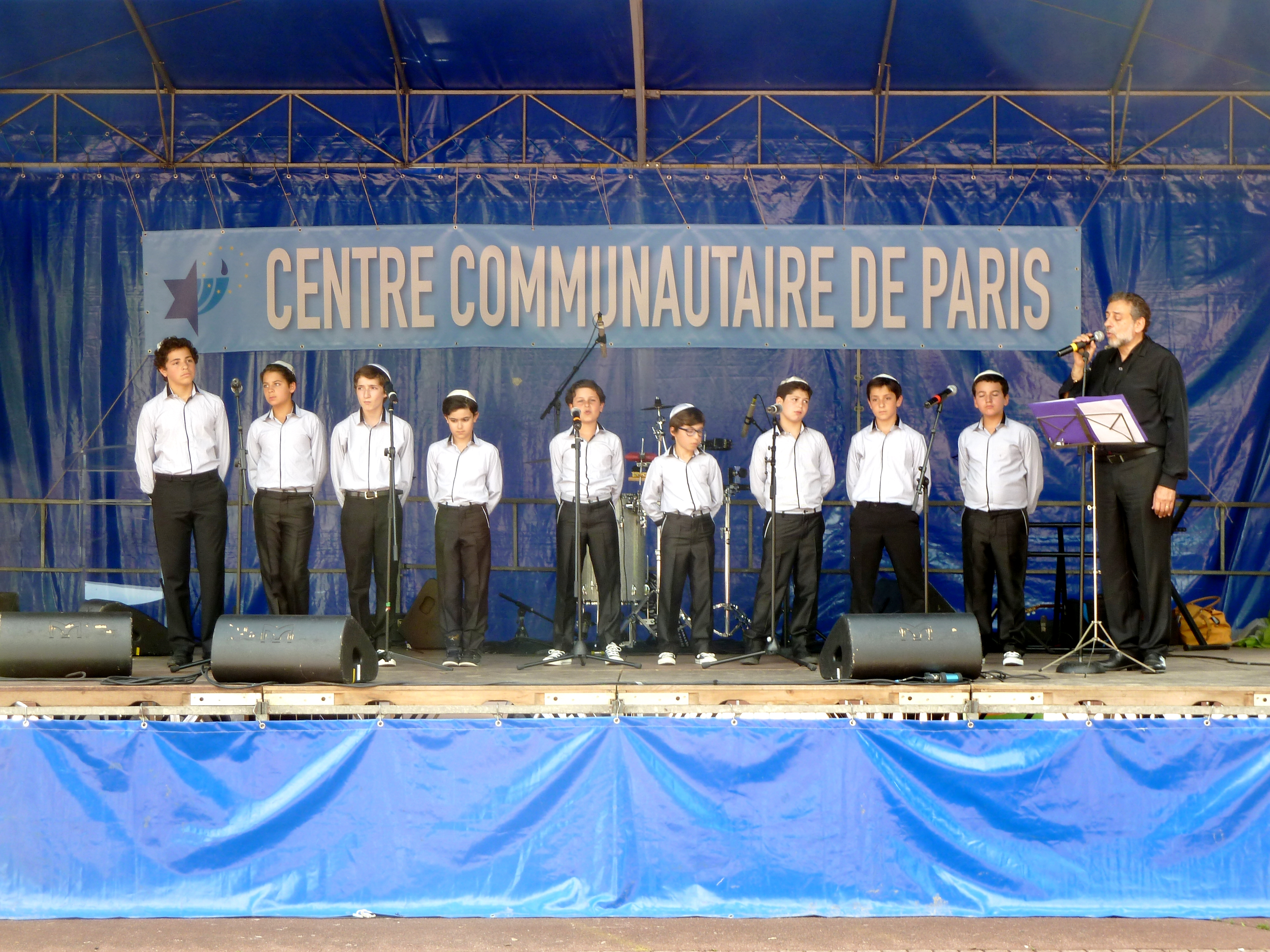 Concert des Chevatim au parc de la Brèche à Créteil le 30 juin 2013, dans le cadre de la journée champêtre organisée par le Centre Communautaire (juif) de Paris. A droite Elie Botbol.